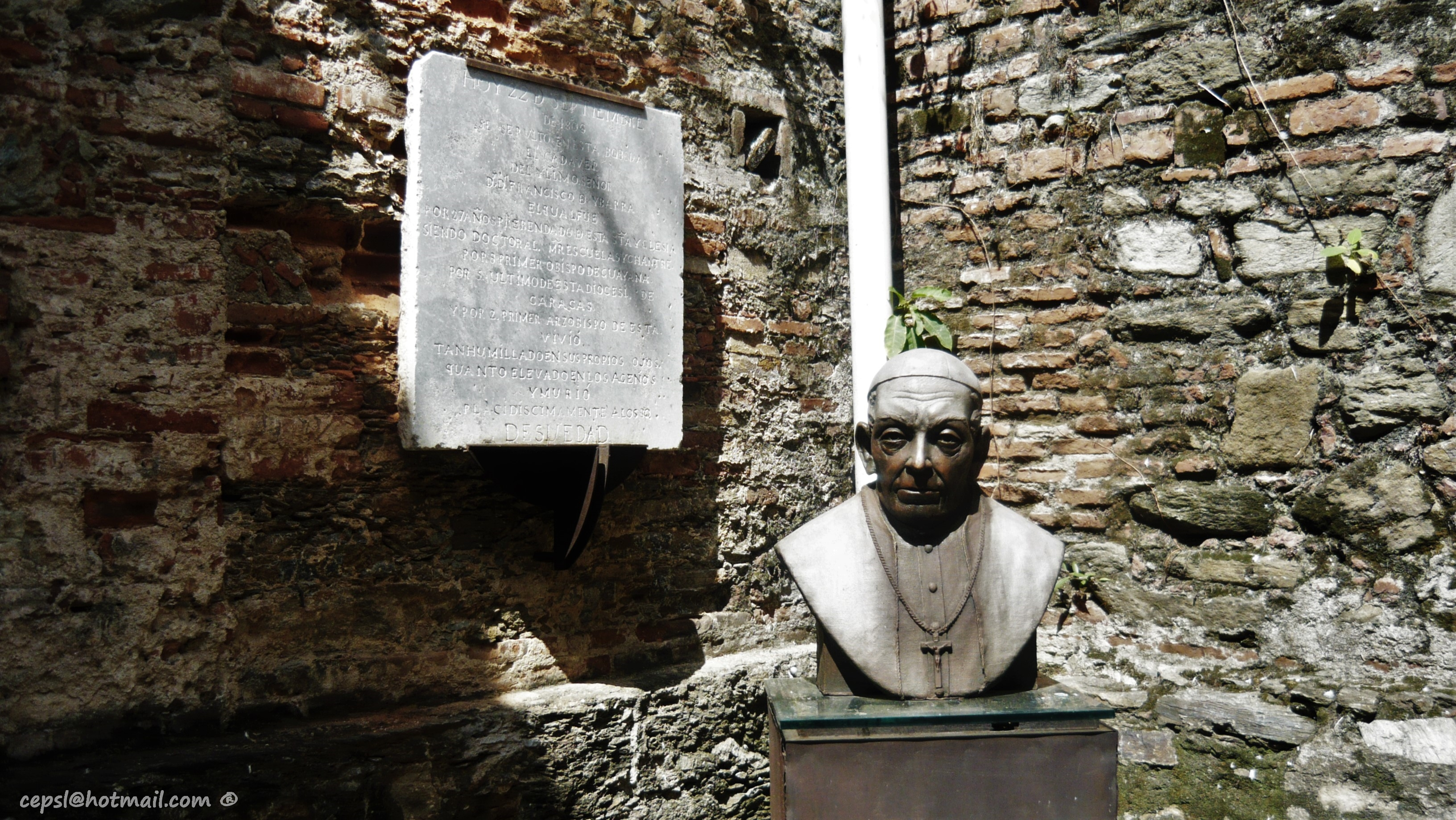 MONSEÑOR FRANCISCO IBARRA, “PRIMER ARZOBISPO DE VENEZUELA” – Escultura de Alexis Mujica.